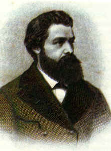 Ezequiel Uricoechea (1843–1880)